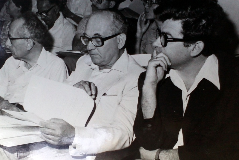 השופטים אהרון ברק ומנחם אלון